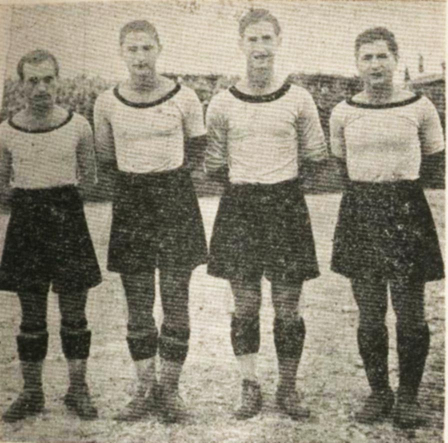 Οι αθλητές της ΑΕΚ Αλ. Χατζησταυρίδης, Τρ. Τζανέττης, Κλ. Μαρόπουλος, Κ. Χριστοδούλου πριν από τον Β' Παγκόσμιο Πόλεμο